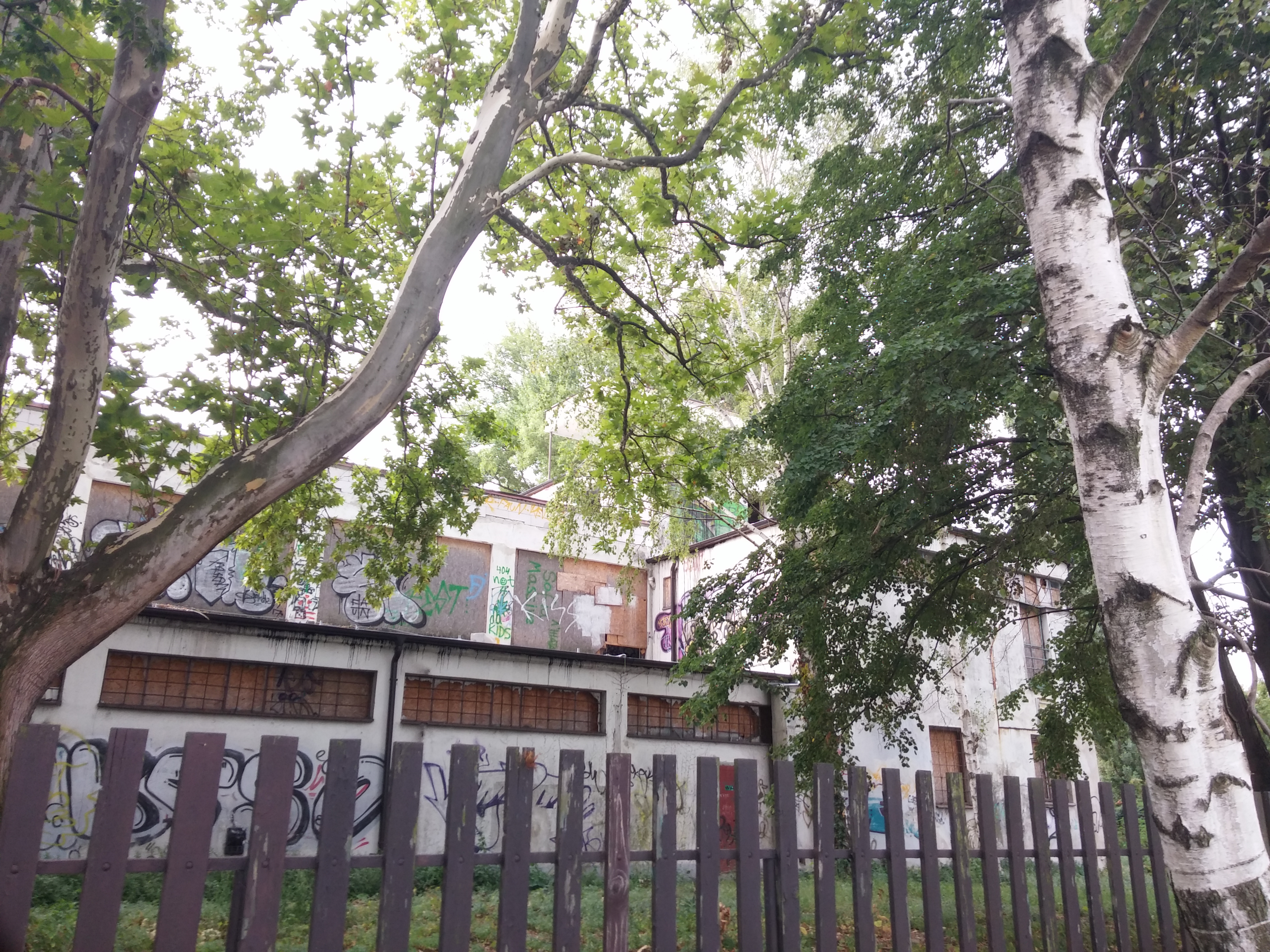 Nemecký veslársky klub, Petržalka